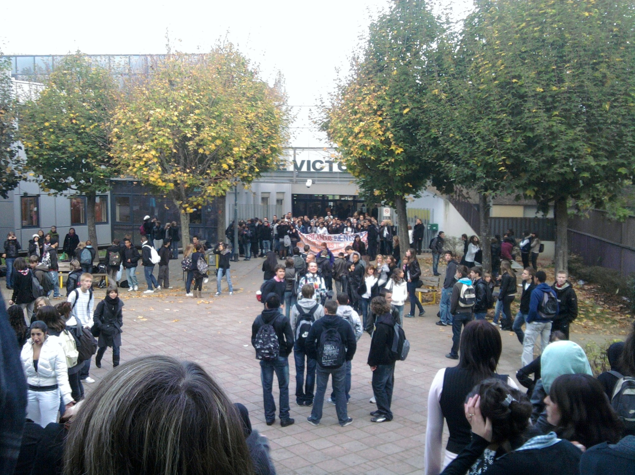 Blocus du lycée Victor Hugo de Besançon-Planoise contre la réforme des retraites, le 14 octobre 2010.